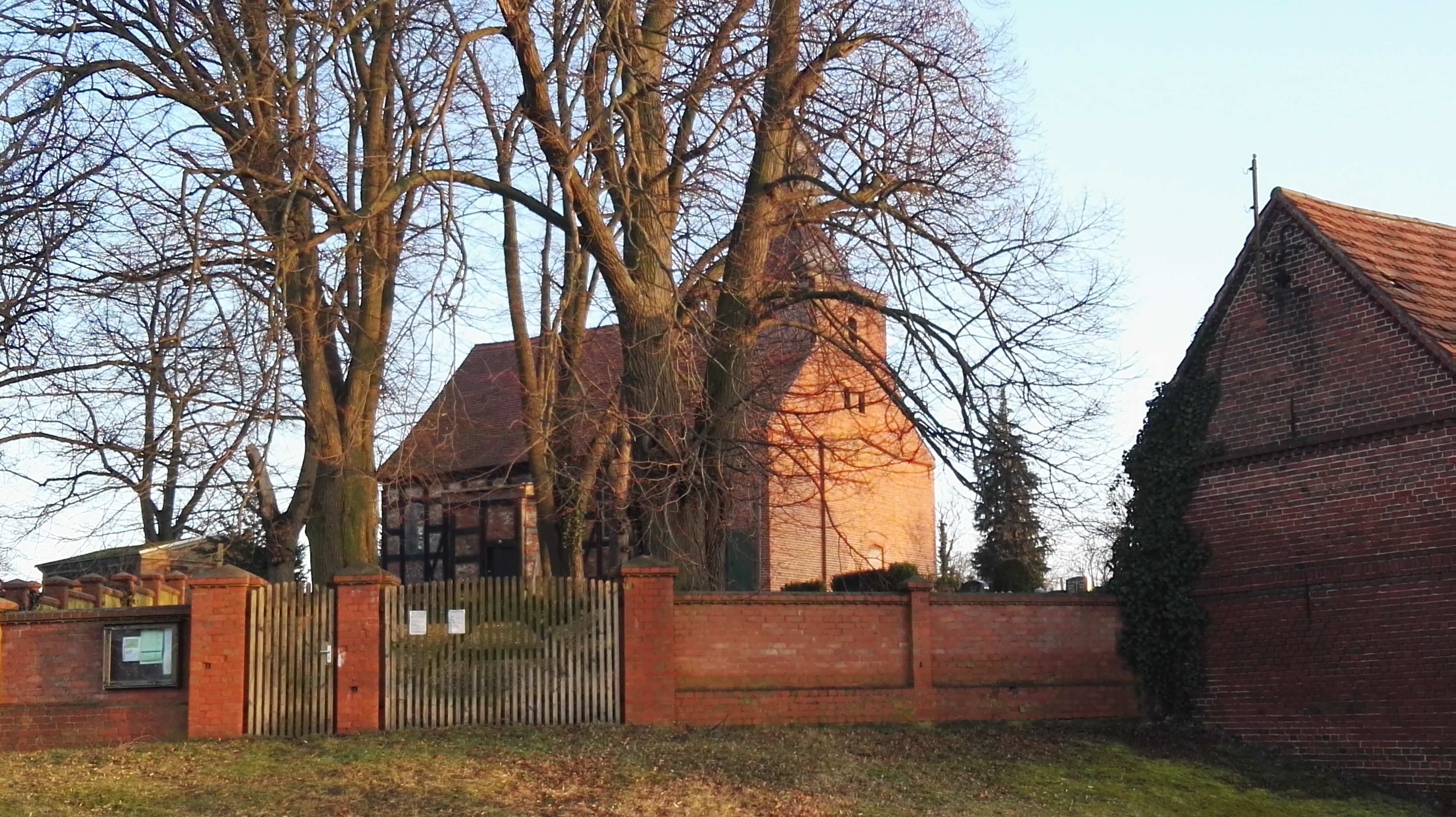 Denkmalgeschützte Kirche in Landin, Ortsteil der Gemeinde Kotzen in Brandenburg